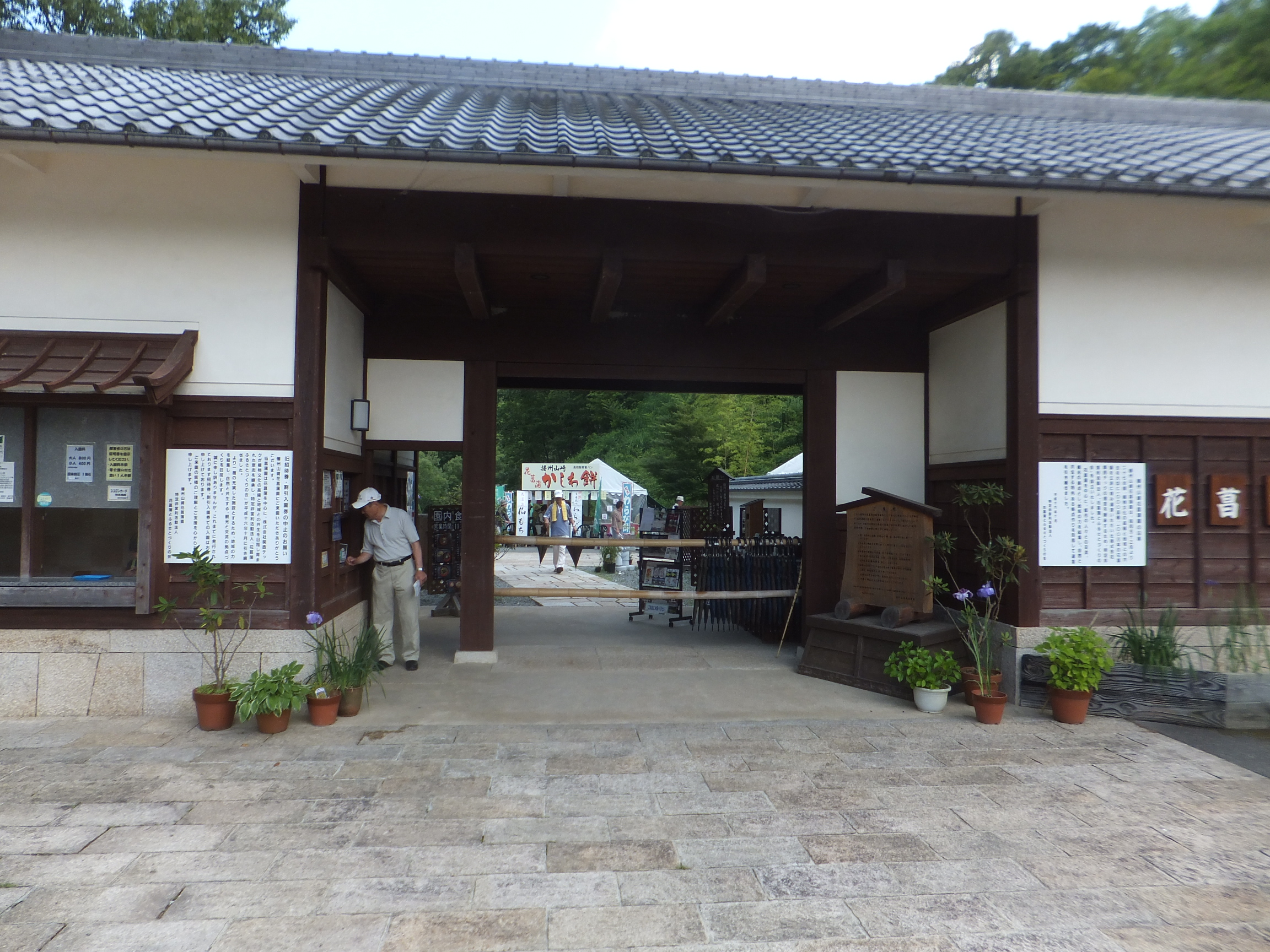 播州山崎花菖蒲園（2013年6月16日）